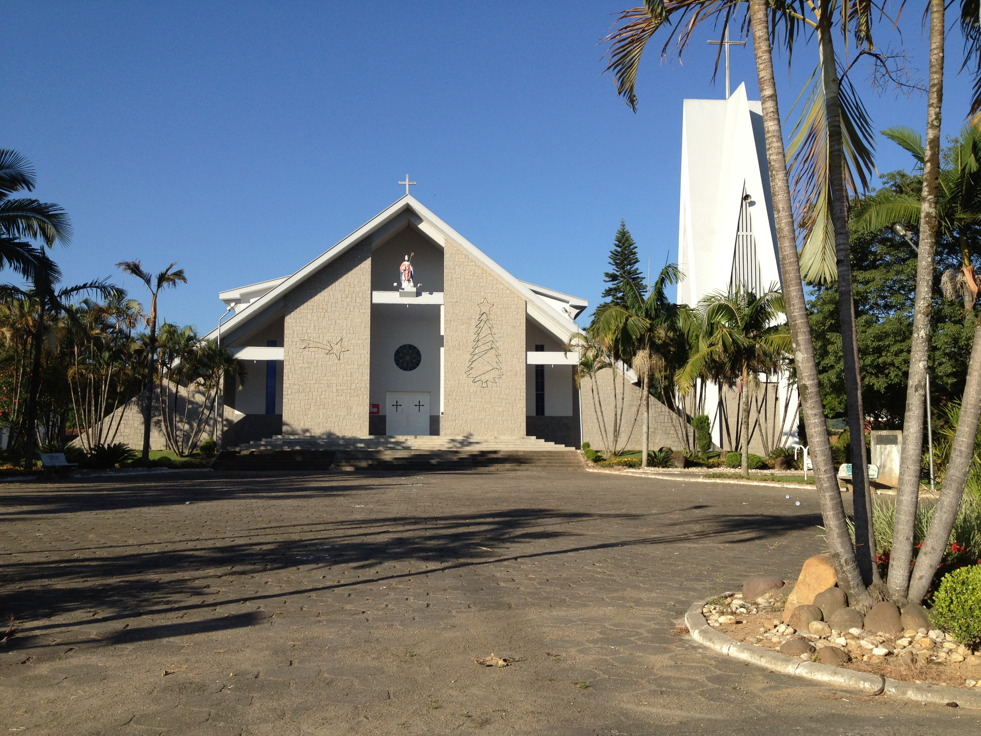 Igreja de São Ludgero